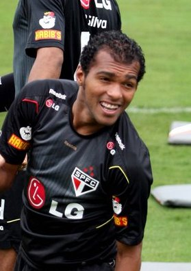 O jogador Richarlyson em 2009.